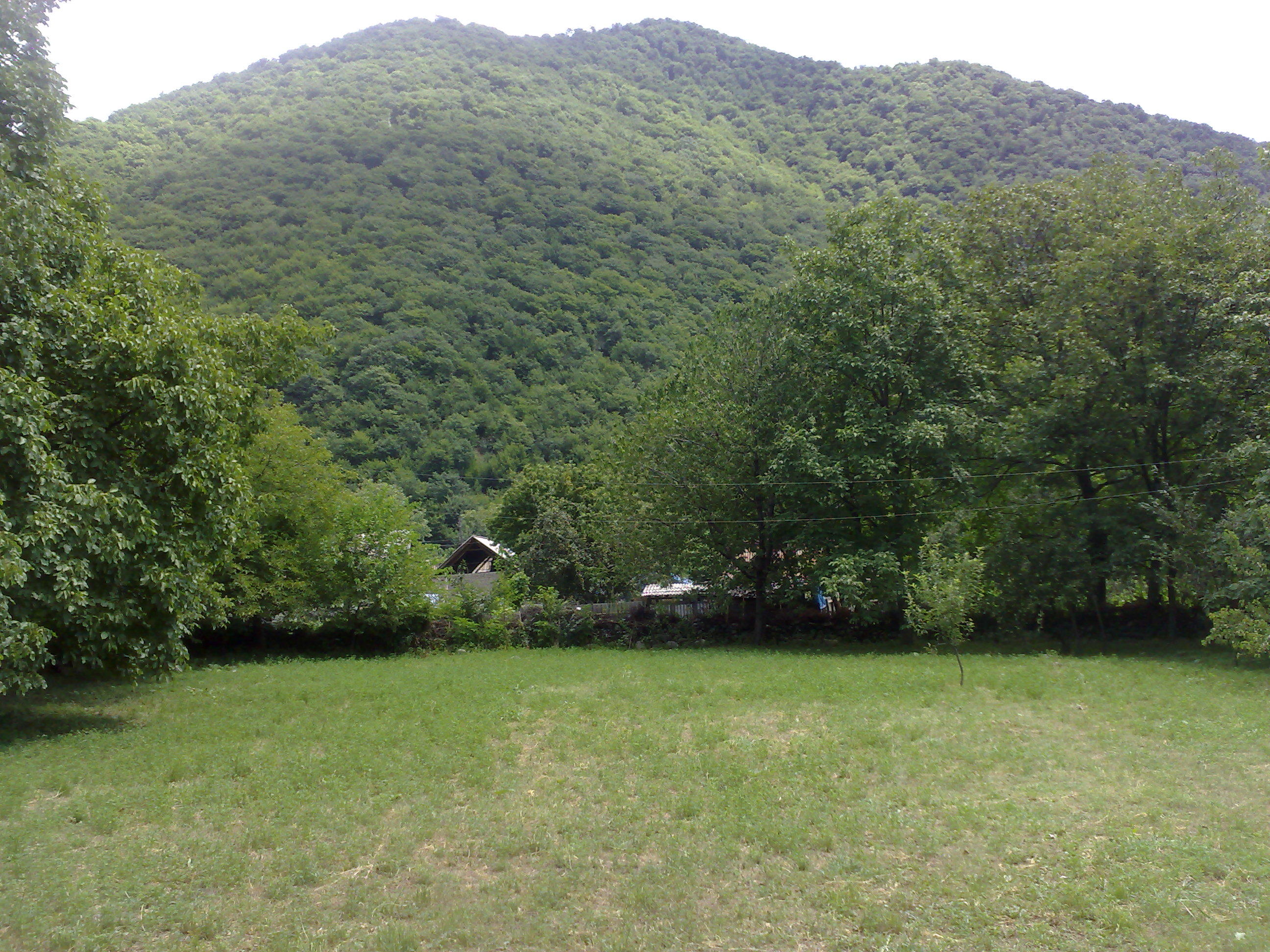 Азербайджан, шекинский район, село Баш келдак, горы большого кавказа